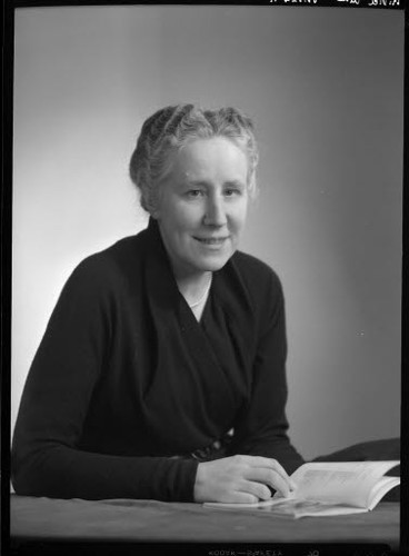 Hélène Rivier, Atelier Boissonnas